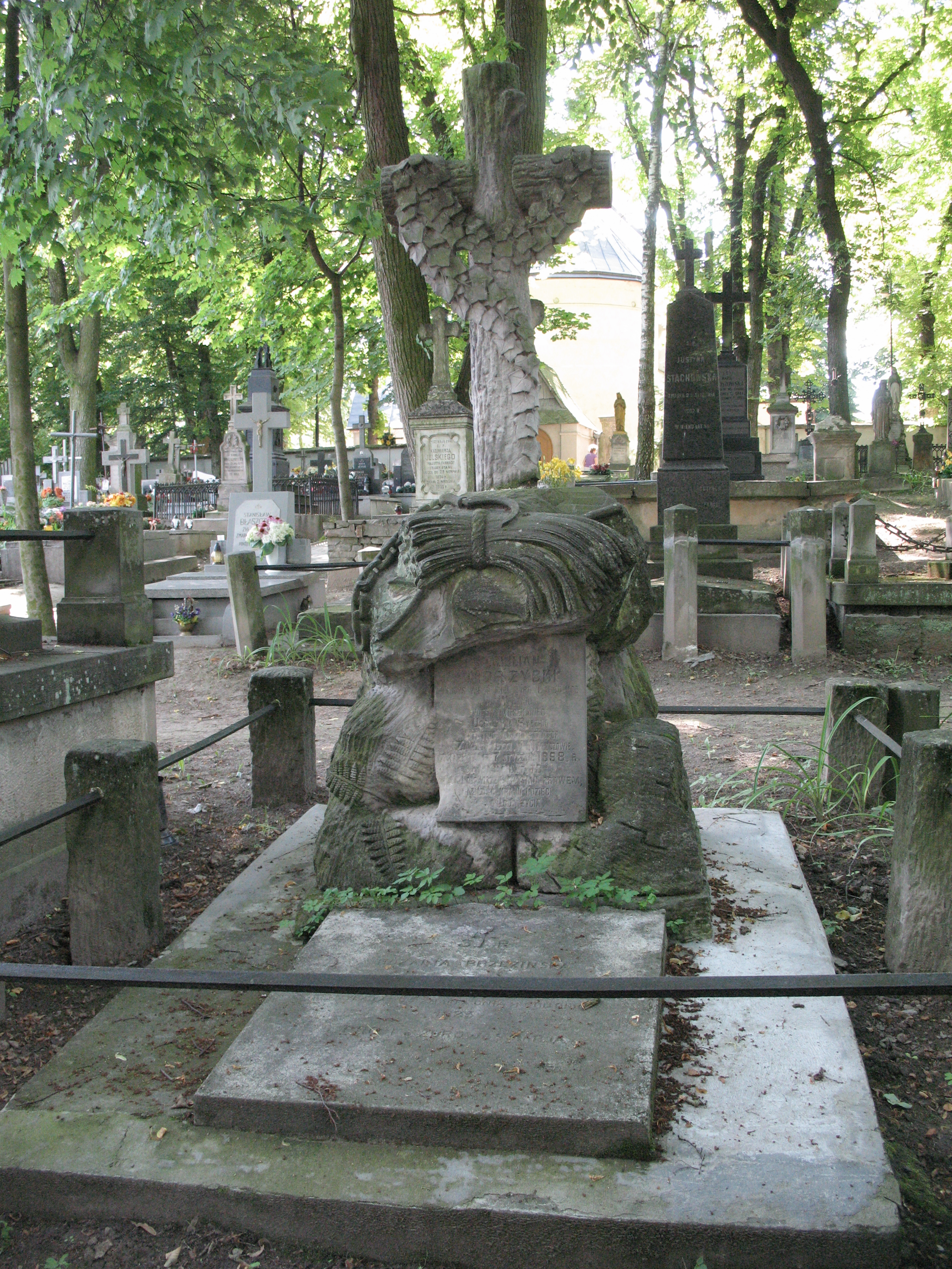 Naleczow, grob Juliana Morzyckiego